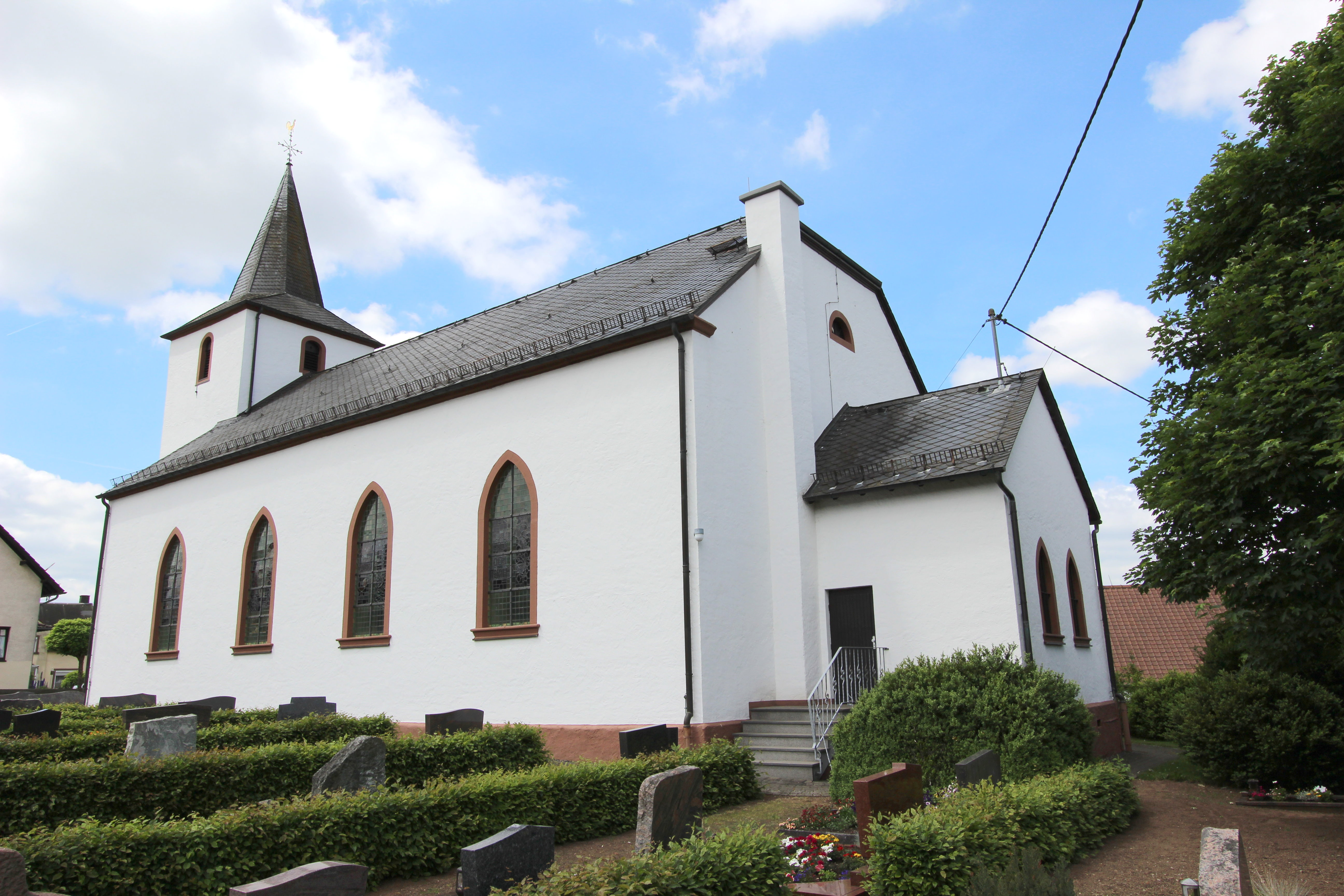 54597 Ormont, Kirchweg 1. Neugotischer Saalbau, 1850. Aufnahme von 2017.